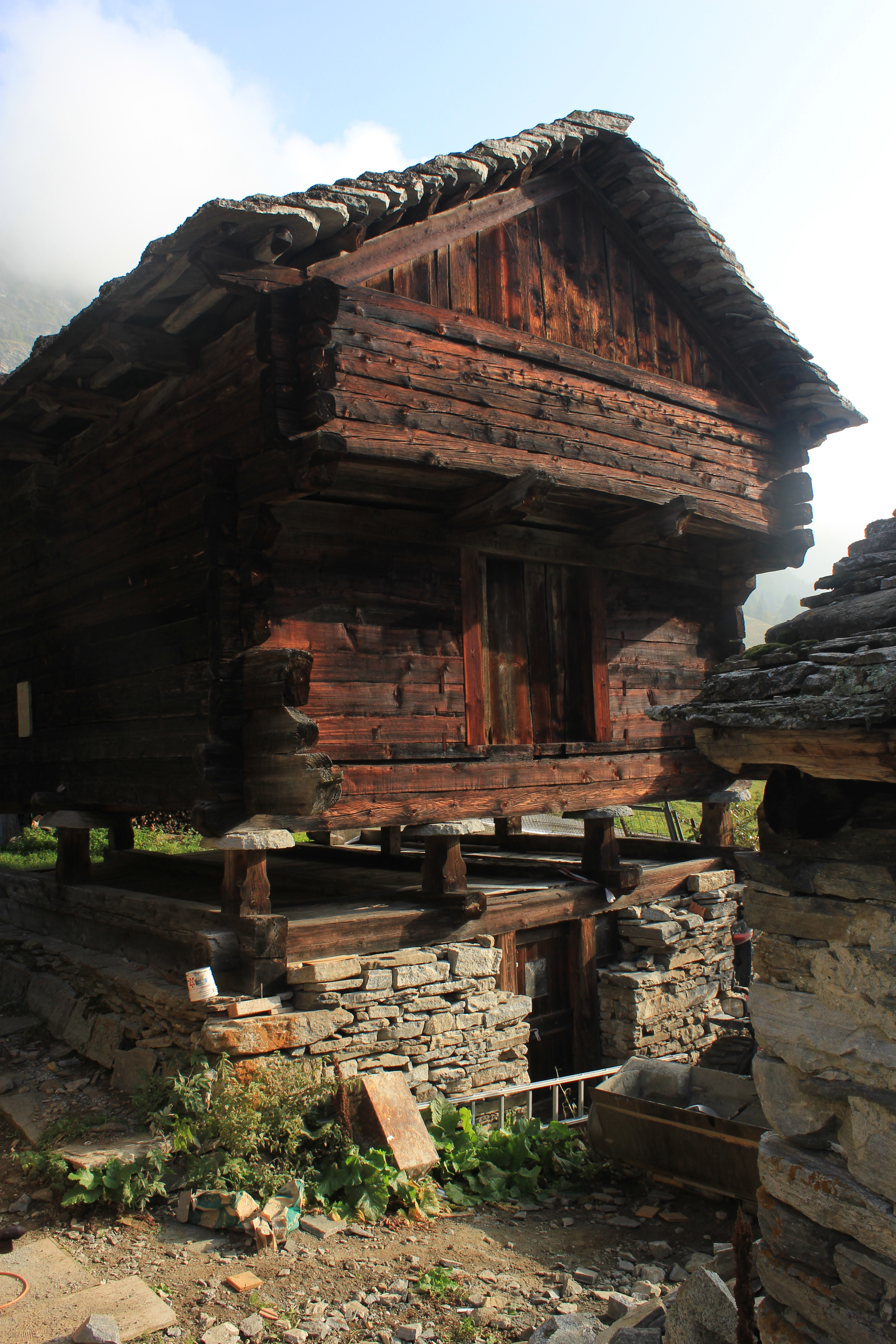 Granaio su sostegni (torba)